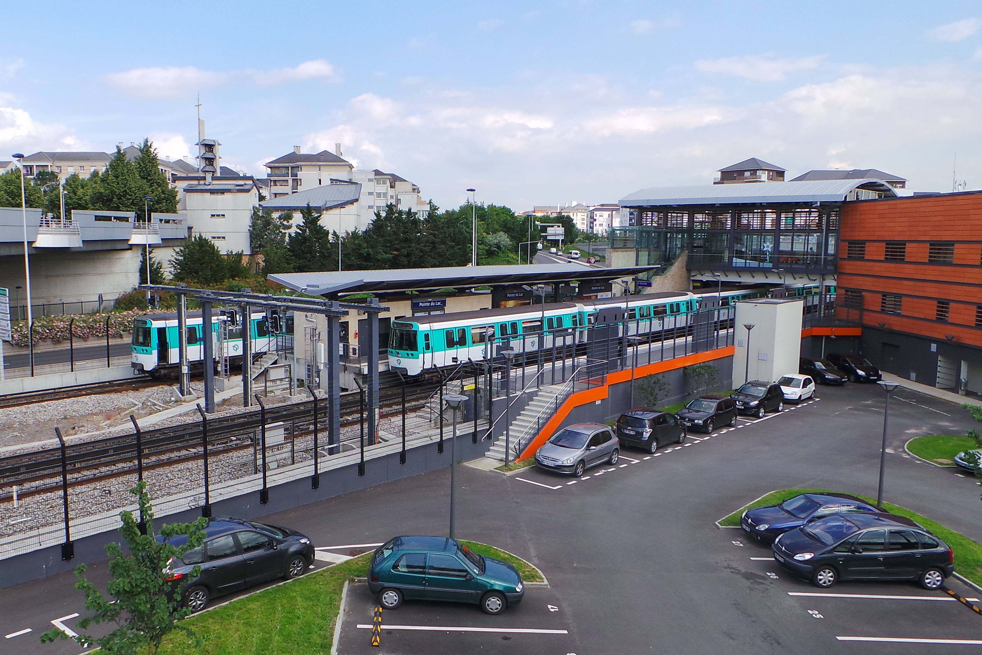 Station de métro Pointe du Lac, métro de Paris ligne 8, Créteil, France